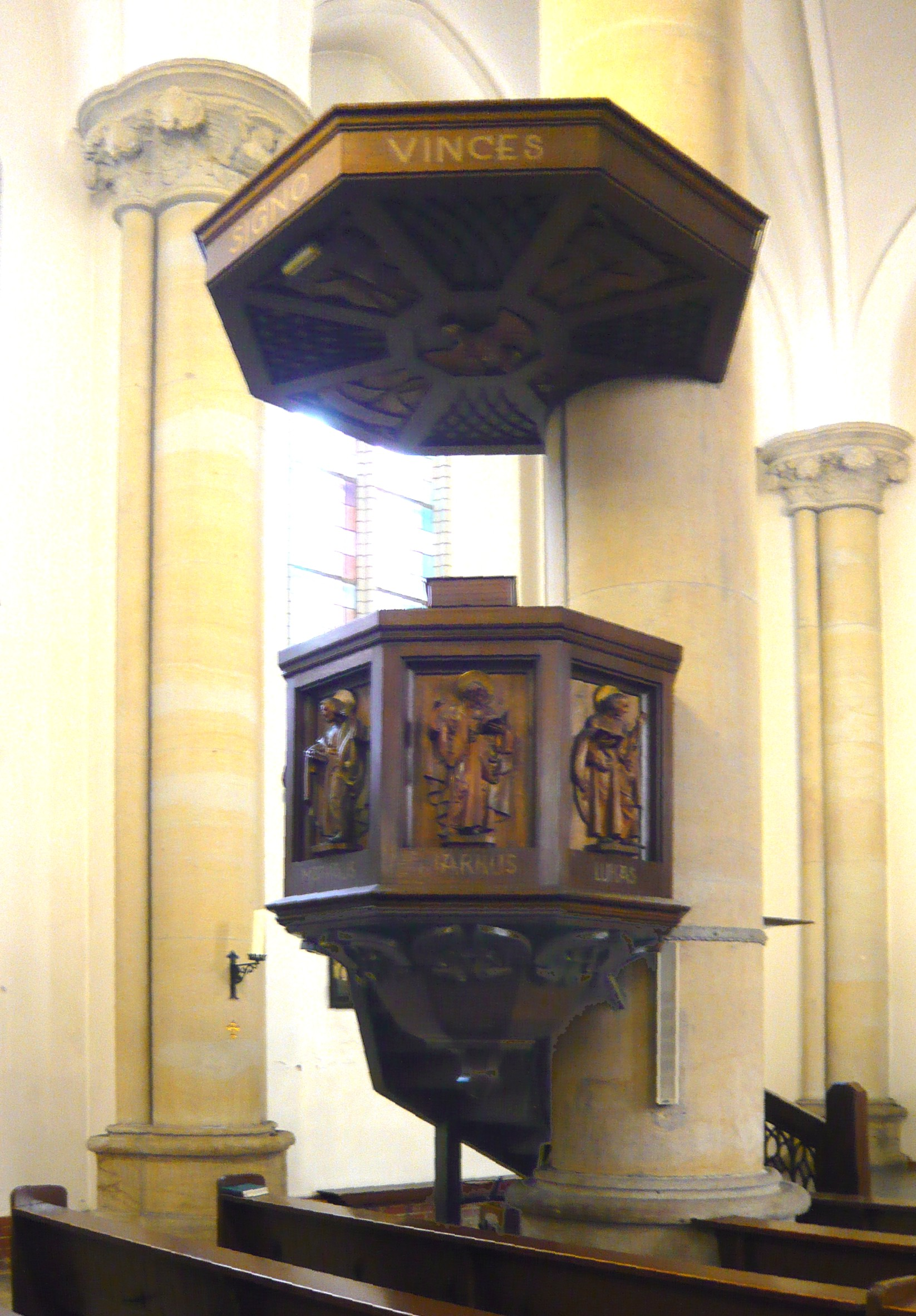 Kath. Kirche S. Corpus Christi, Prenzlauer Berg, Conrad-Blenkle-Straße